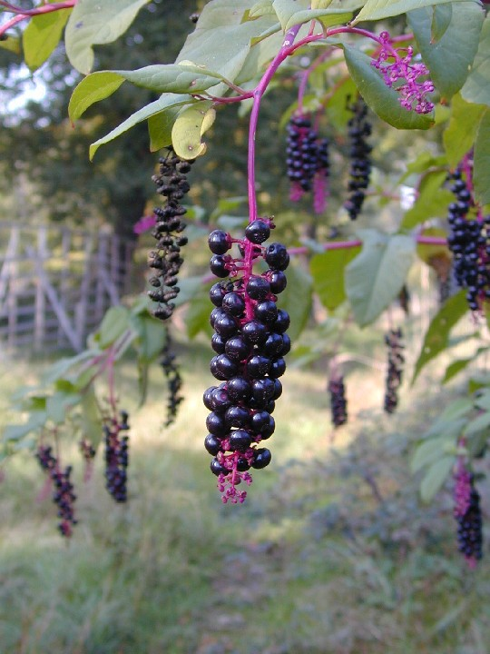 Fruchtstand der Amerikanischen Kermesbeere /Pokeweed berries